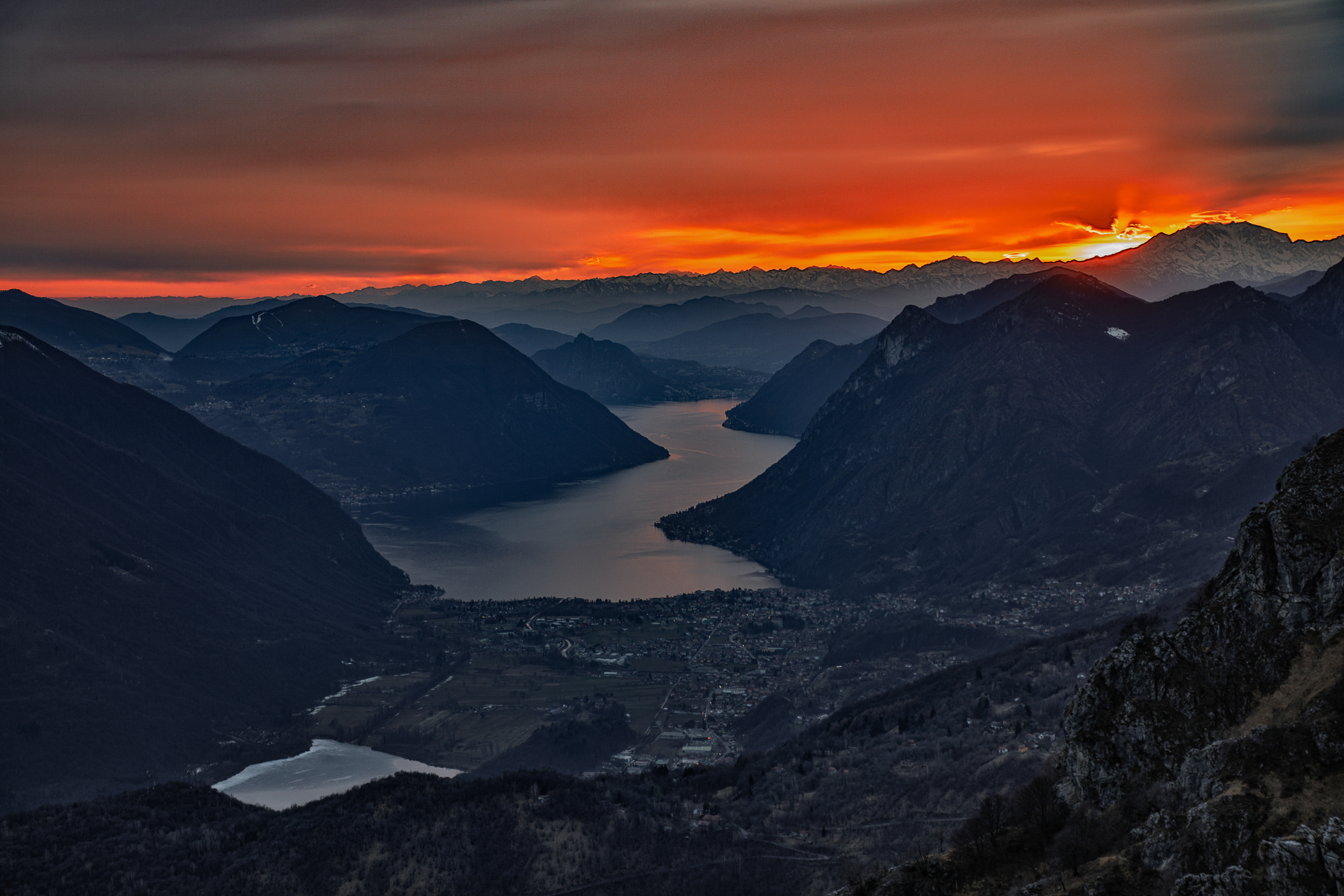 riserva naturale Lago di Piano This is a photo of a monument which is part of cultural heritage of Italy.